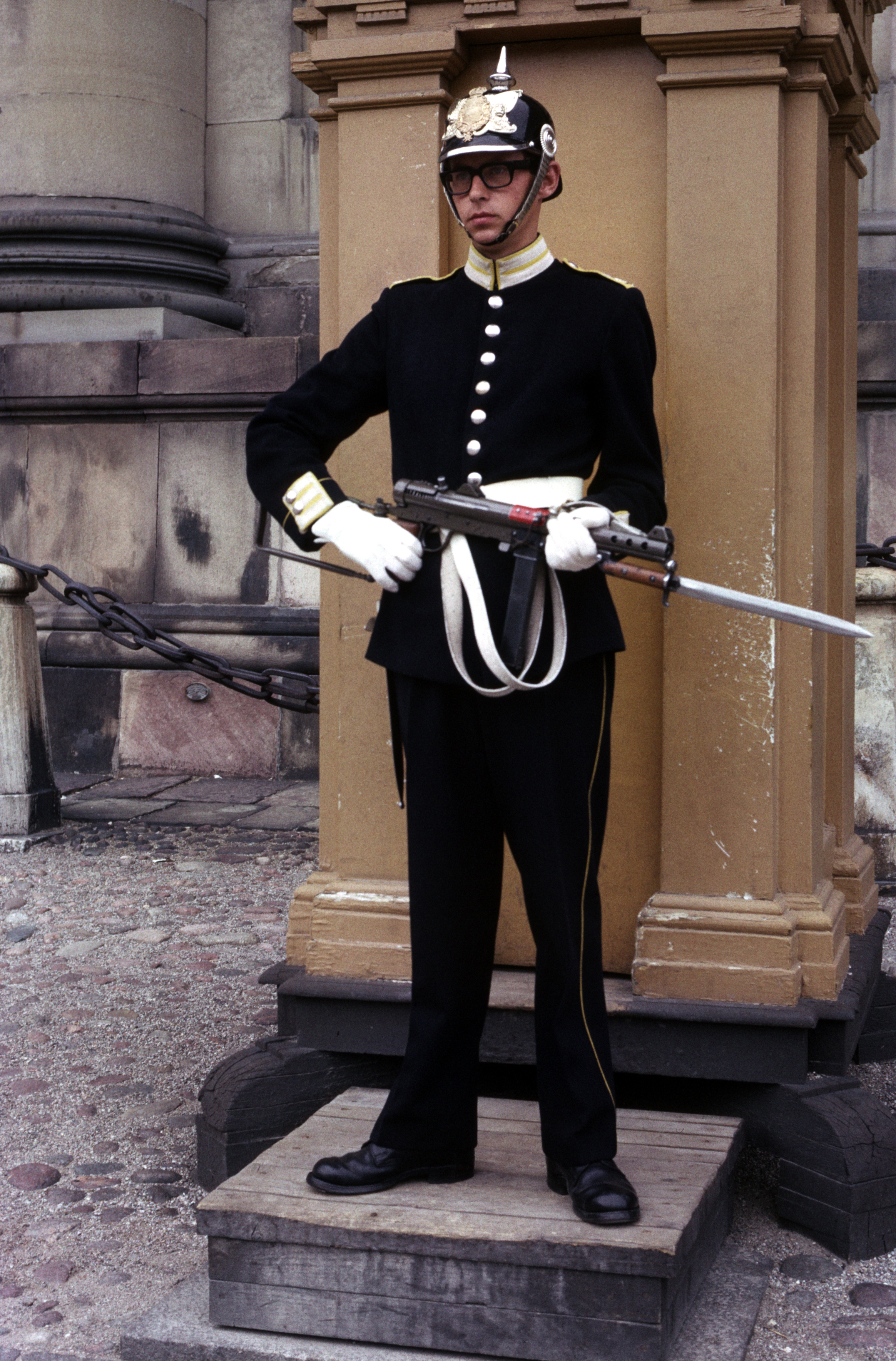 palace guard stockholm